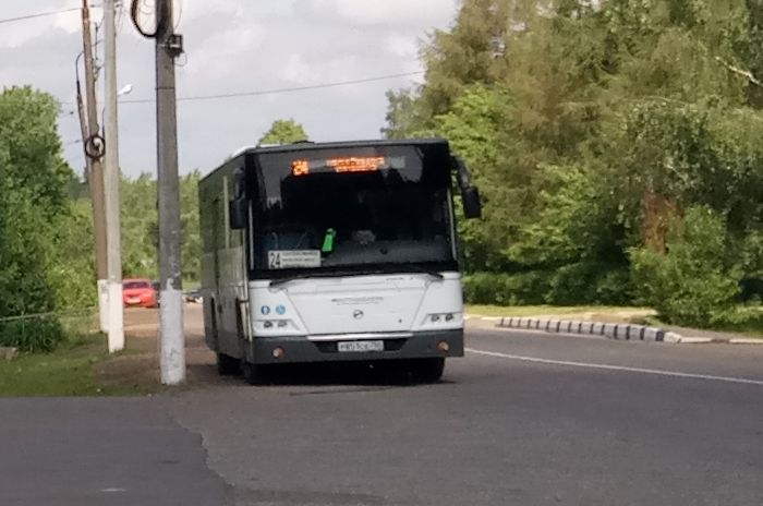 ЛиАЗ-Вояж, модель 5250 Ликинского завода